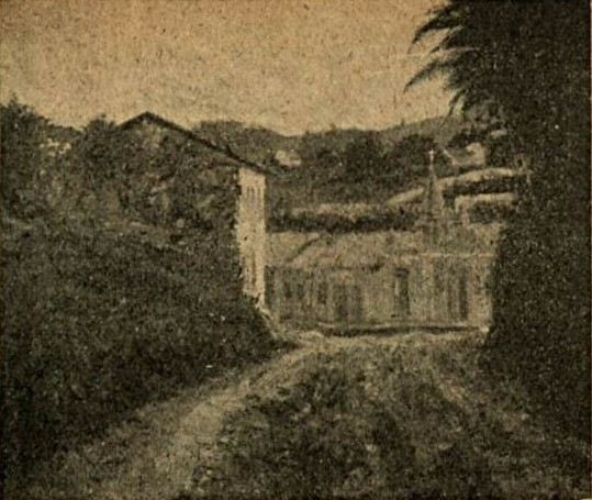 Pintura de Ernesto Quissak executada em 1922, representando uma paisagem urbana. Participou da Exposição Geral de Belas Artes de 1922, no Rio de Janeiro. Publicada na Revista Fon-Fon em 28 de outubro de 1922.